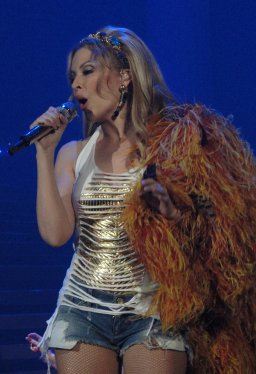 Kylie Minogue - San Francisco 5/21/2011